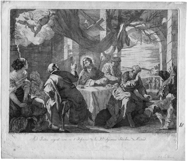 Cena de Emaús, grabado de José del Castillo a partir de un cuadro de Mateo Cerezo que se encontraba en el refectorio del convento de Agustino Recoletos de Madrid